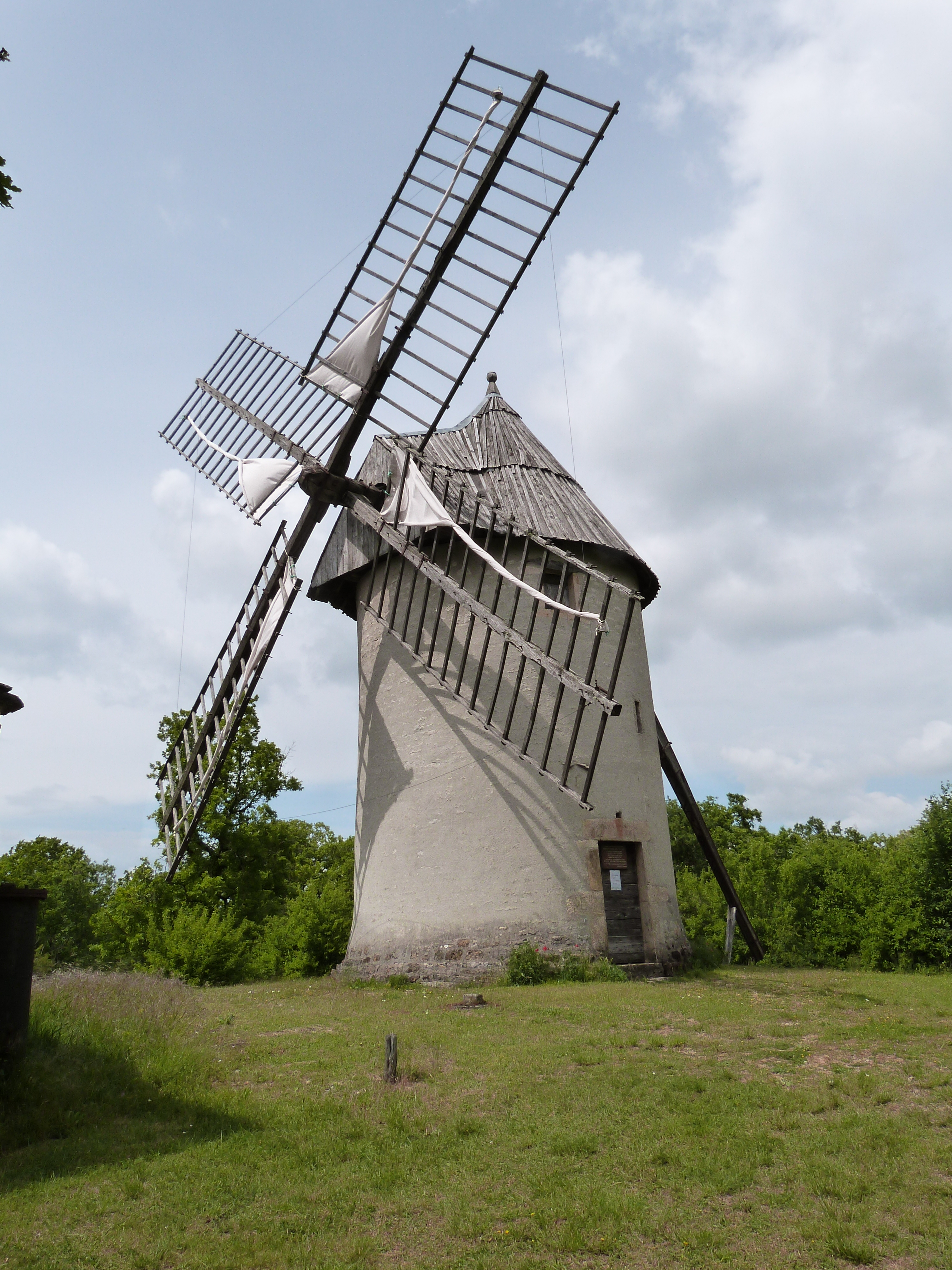 Moulin du Mas de la Bosse avec ses voiles